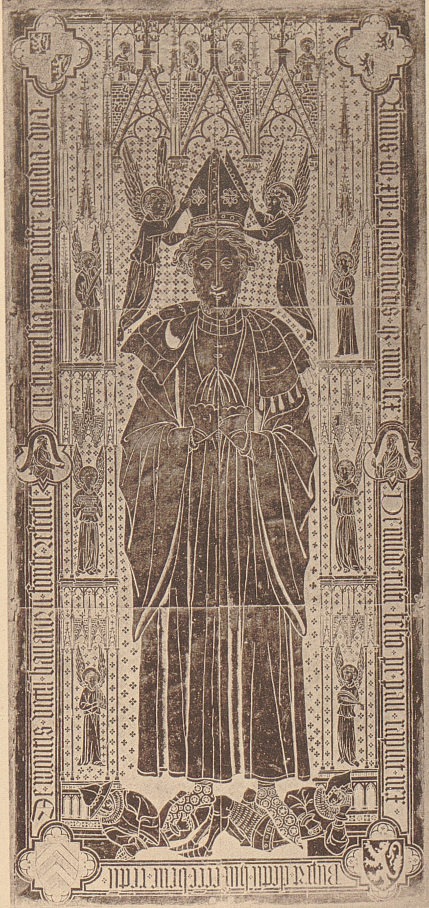 Grabplatte Ruprecht von Berg im Paderborner Dom Inschrift / Inscription